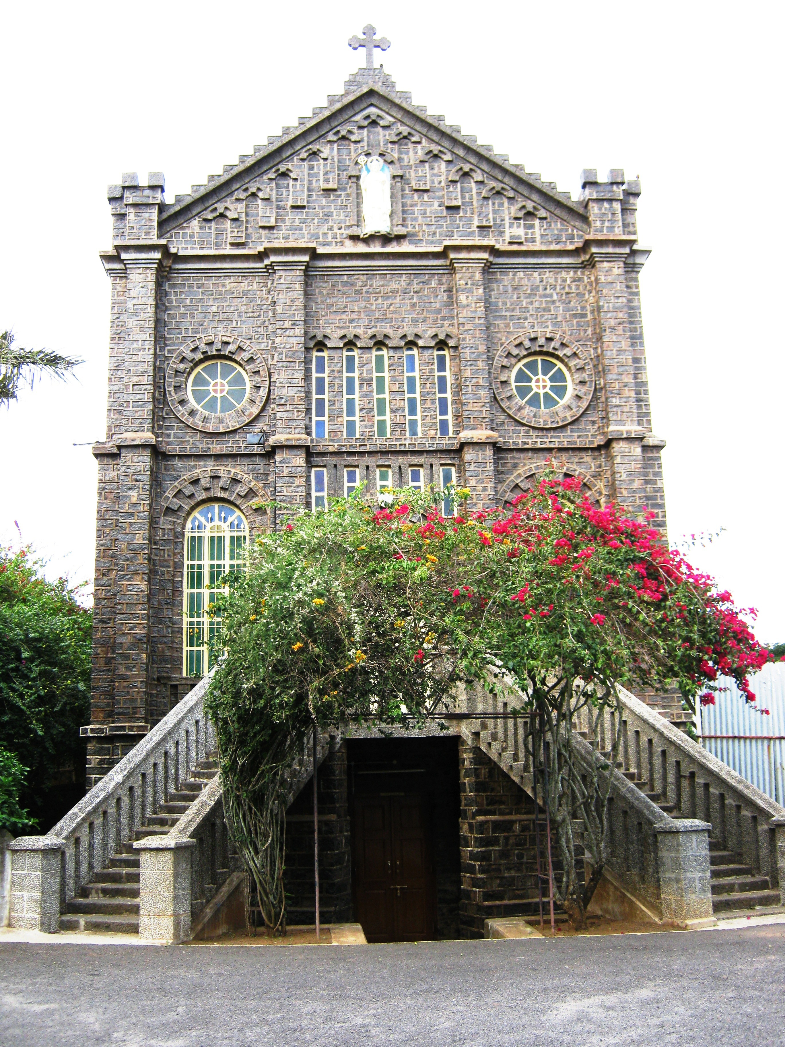 ST. LOUIS MONTFORT SCHOOL CHURCH, Yercaud, Salem